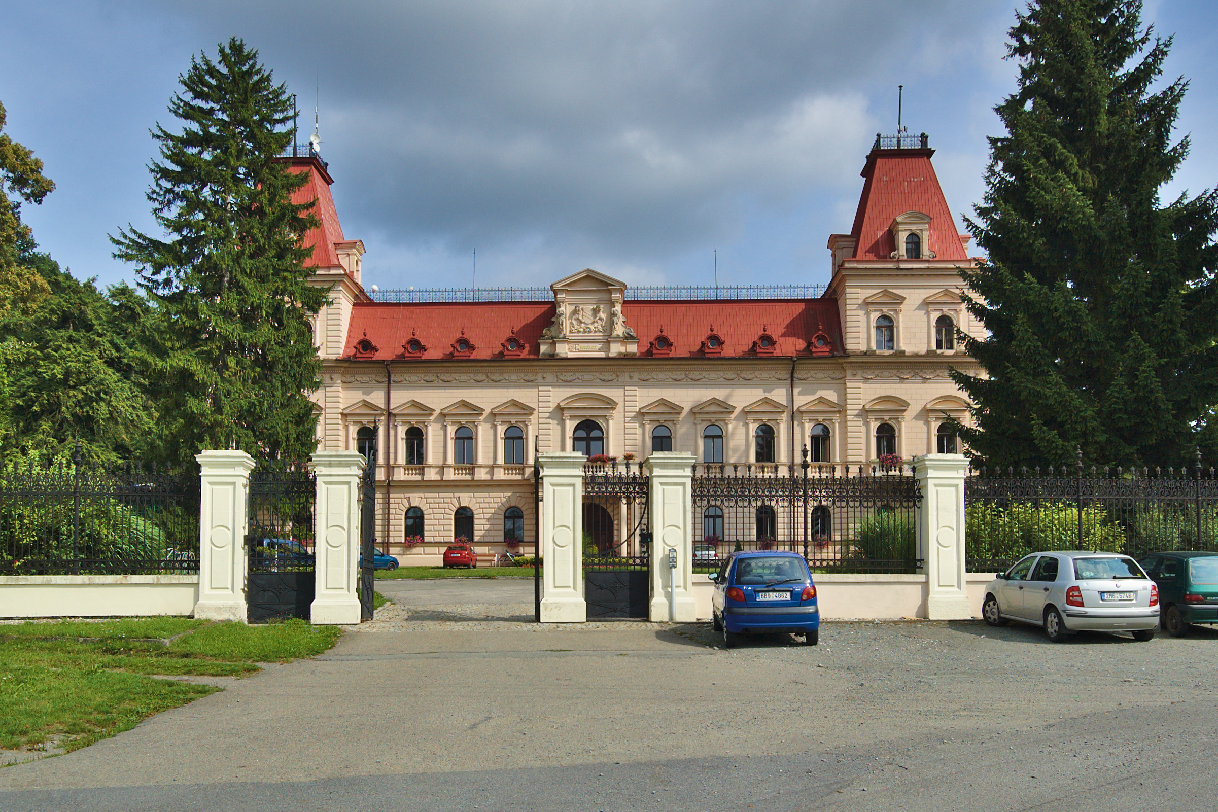 Zámek, Šebetov, okres Blansko